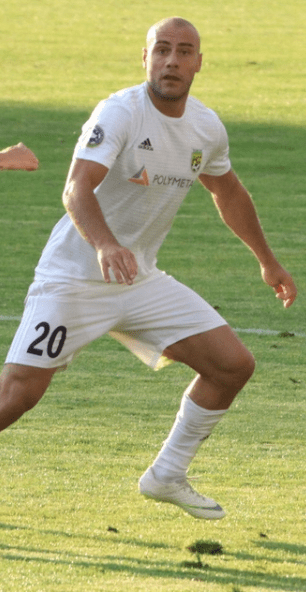 Джаба Канкава в составе ФК Тобол